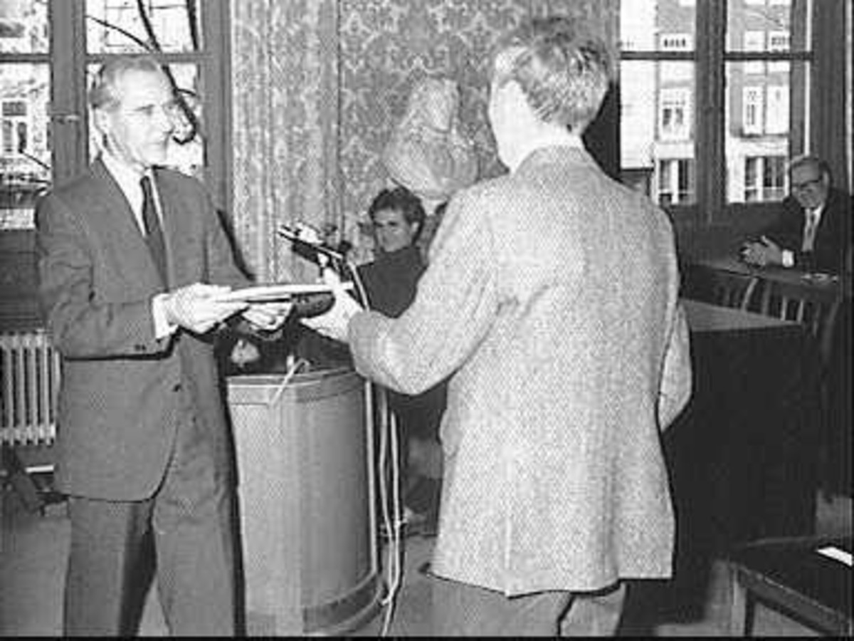 van vlechtwerk tot baksteen: J.Jager Gerlings, J.Voskuil (opmerking: Deze afbeelding hebben wij helaas alleen in deze lage resolutie.)